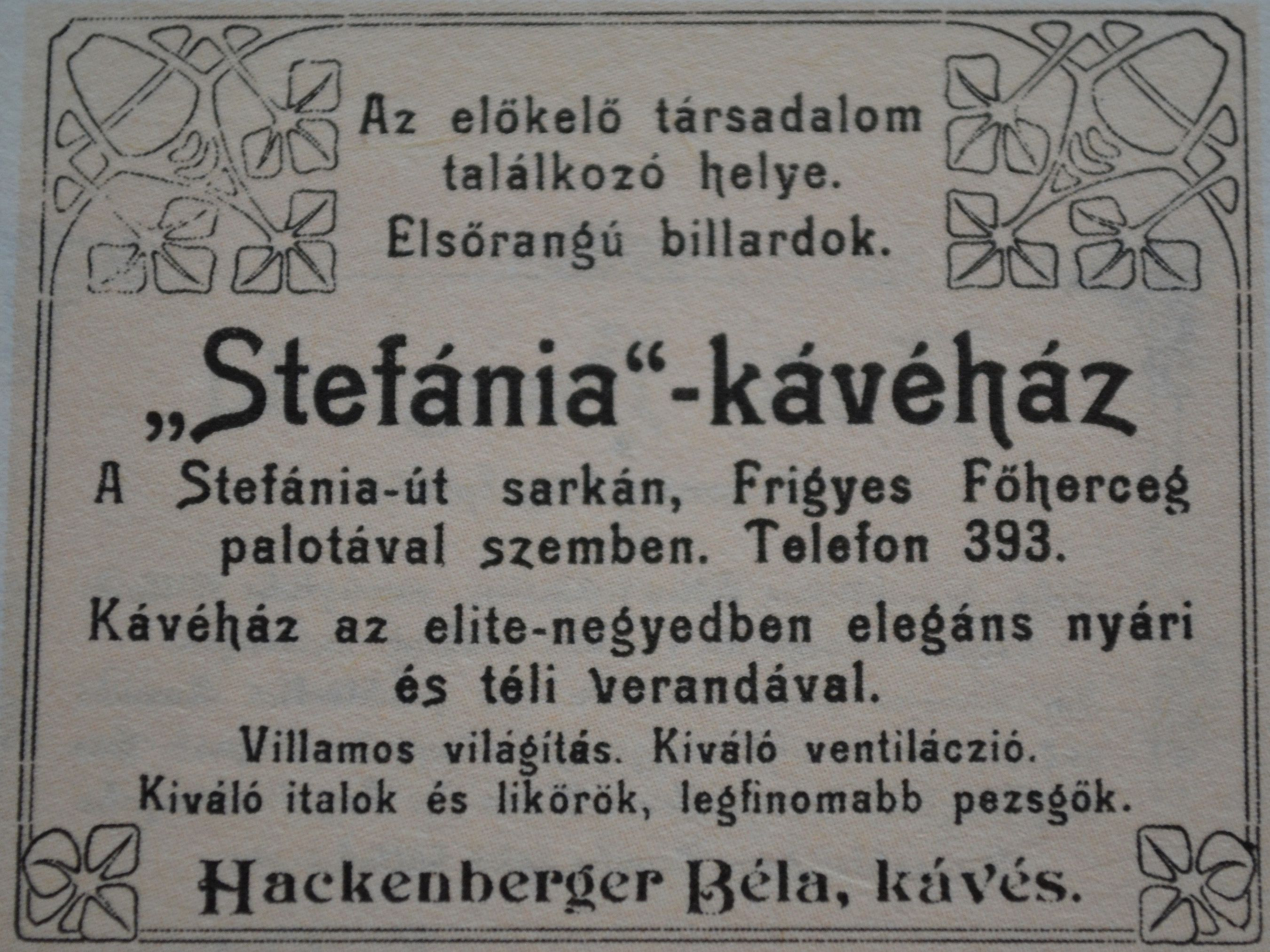 Reklama kaviarne Štefánka